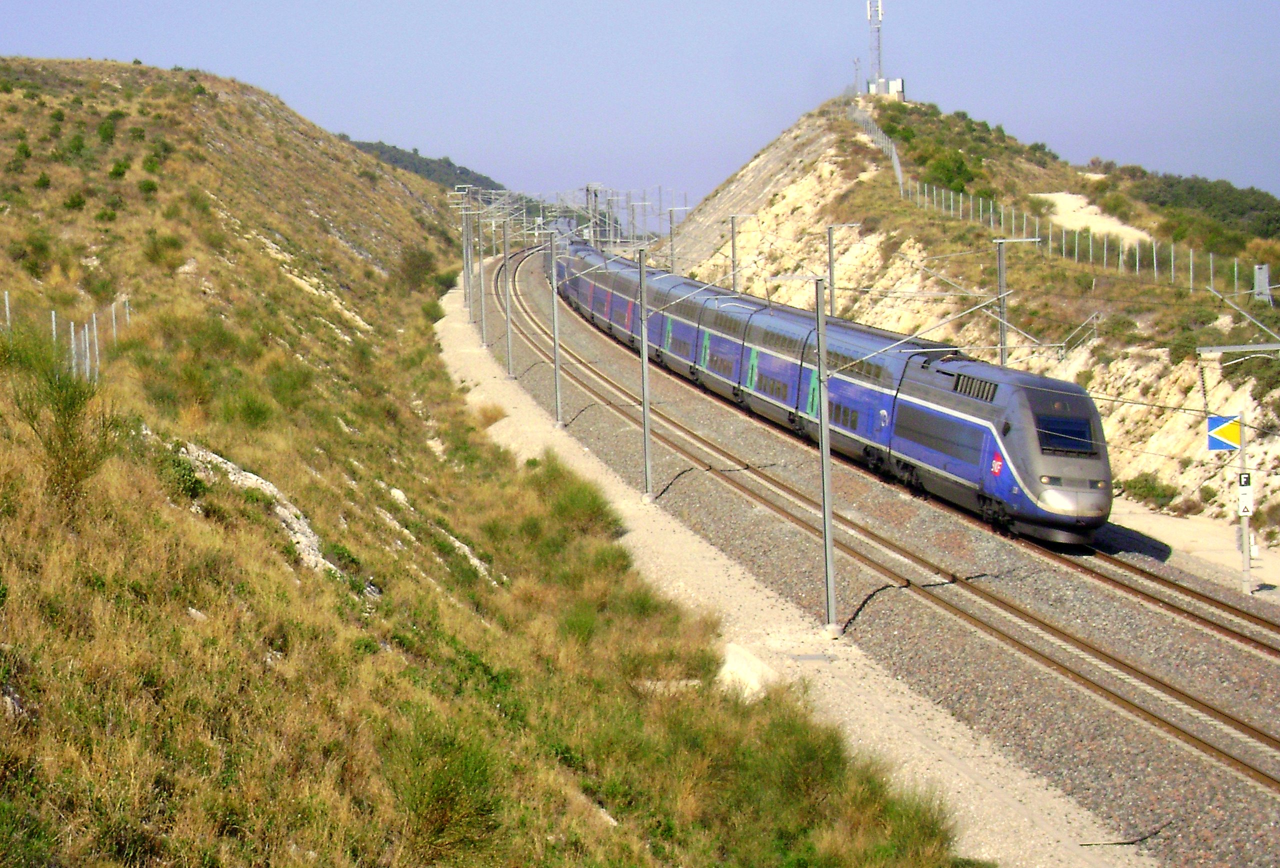 TGV Duplex à 2km d'Avignon TGV